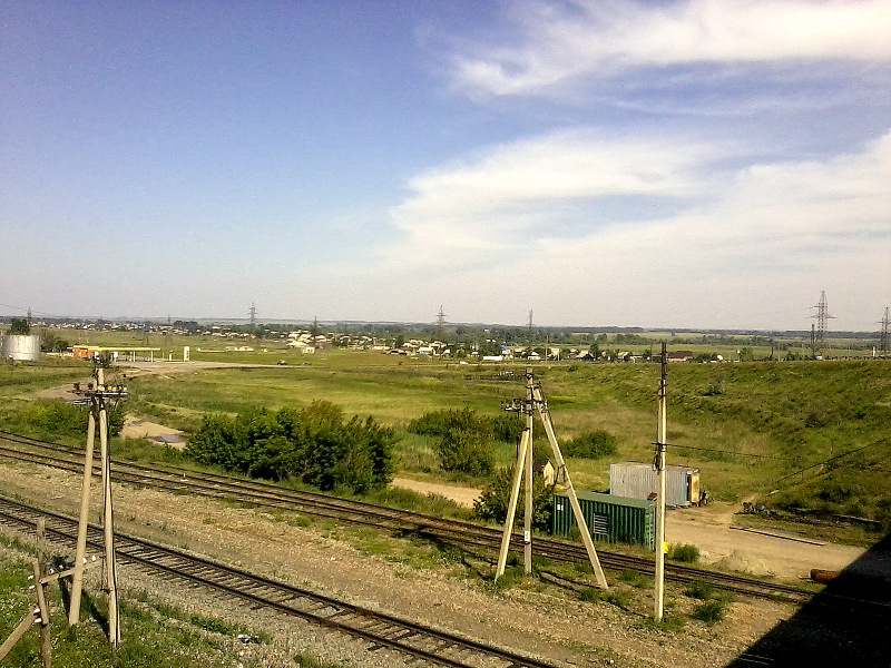 Вид на Малопанюшево с юго-запада, с моста через Турксиб автодороги на Чарышское.